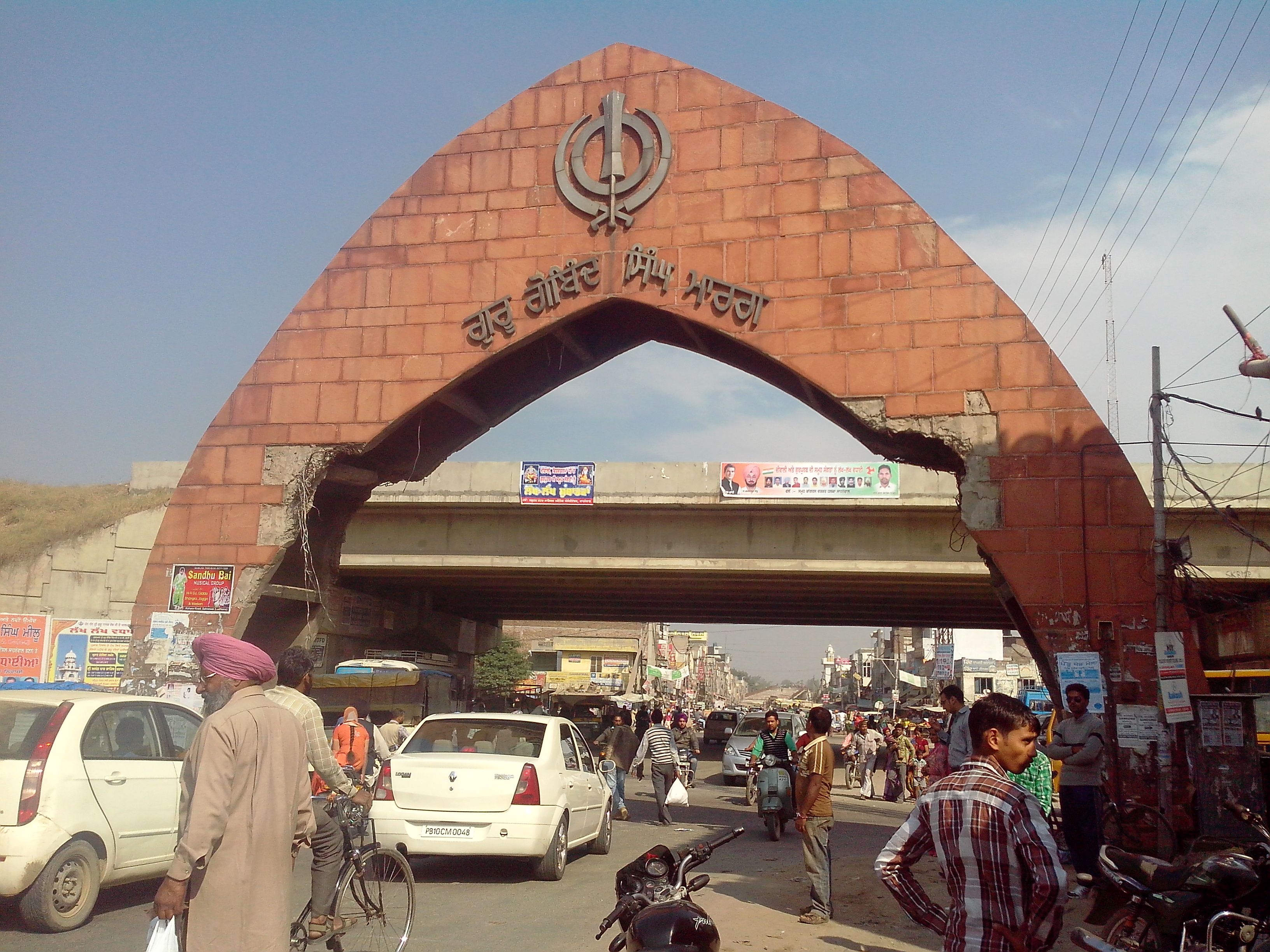 Sahnewal, Ludhiana, Punjab, India